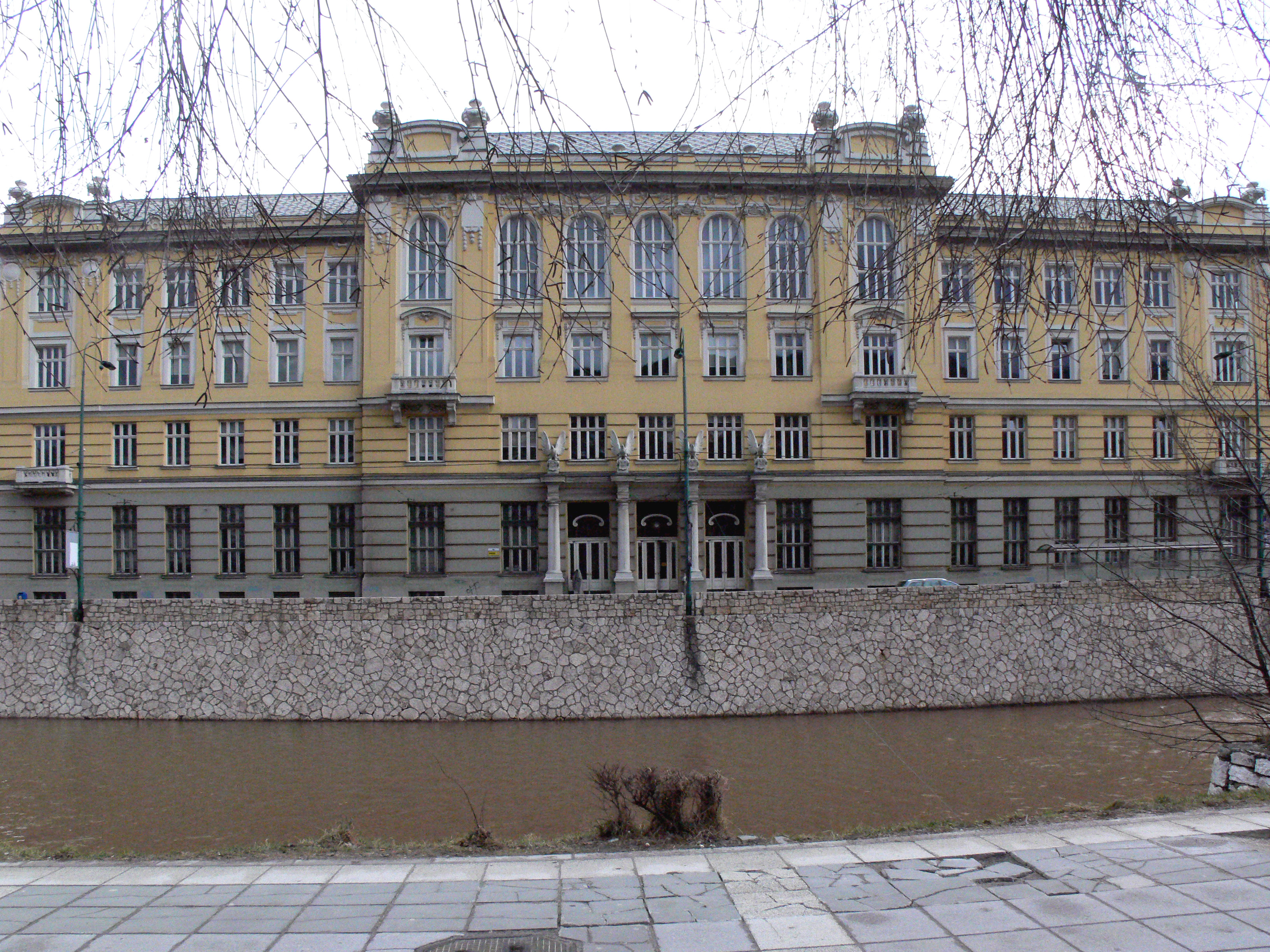 The post in Sarajevo.